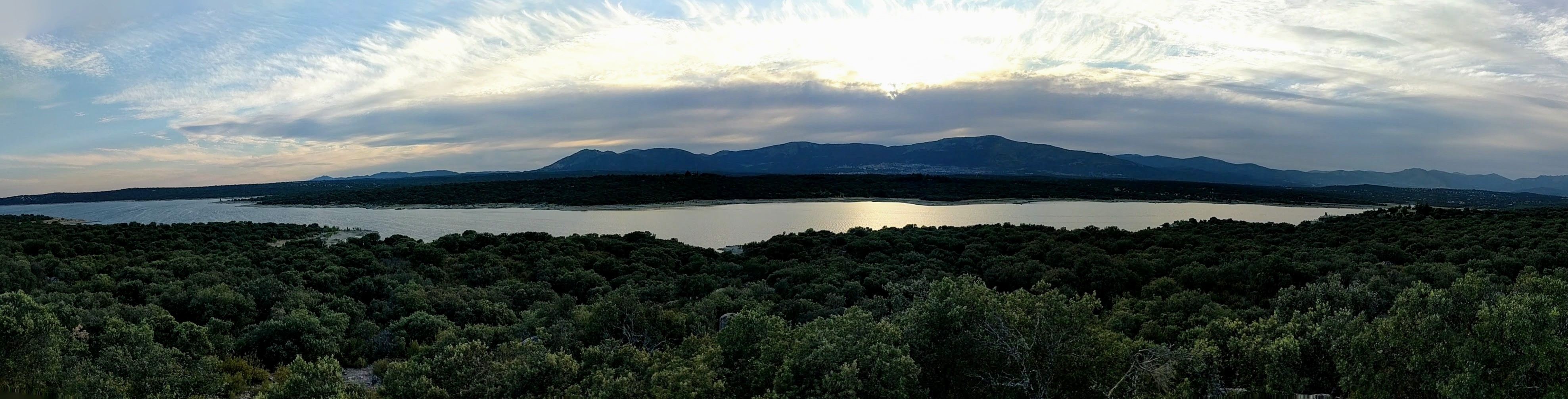 Vista panorámica del embalse de Valmayor desde la vertiente de Colmenarejo (Madrid, España).